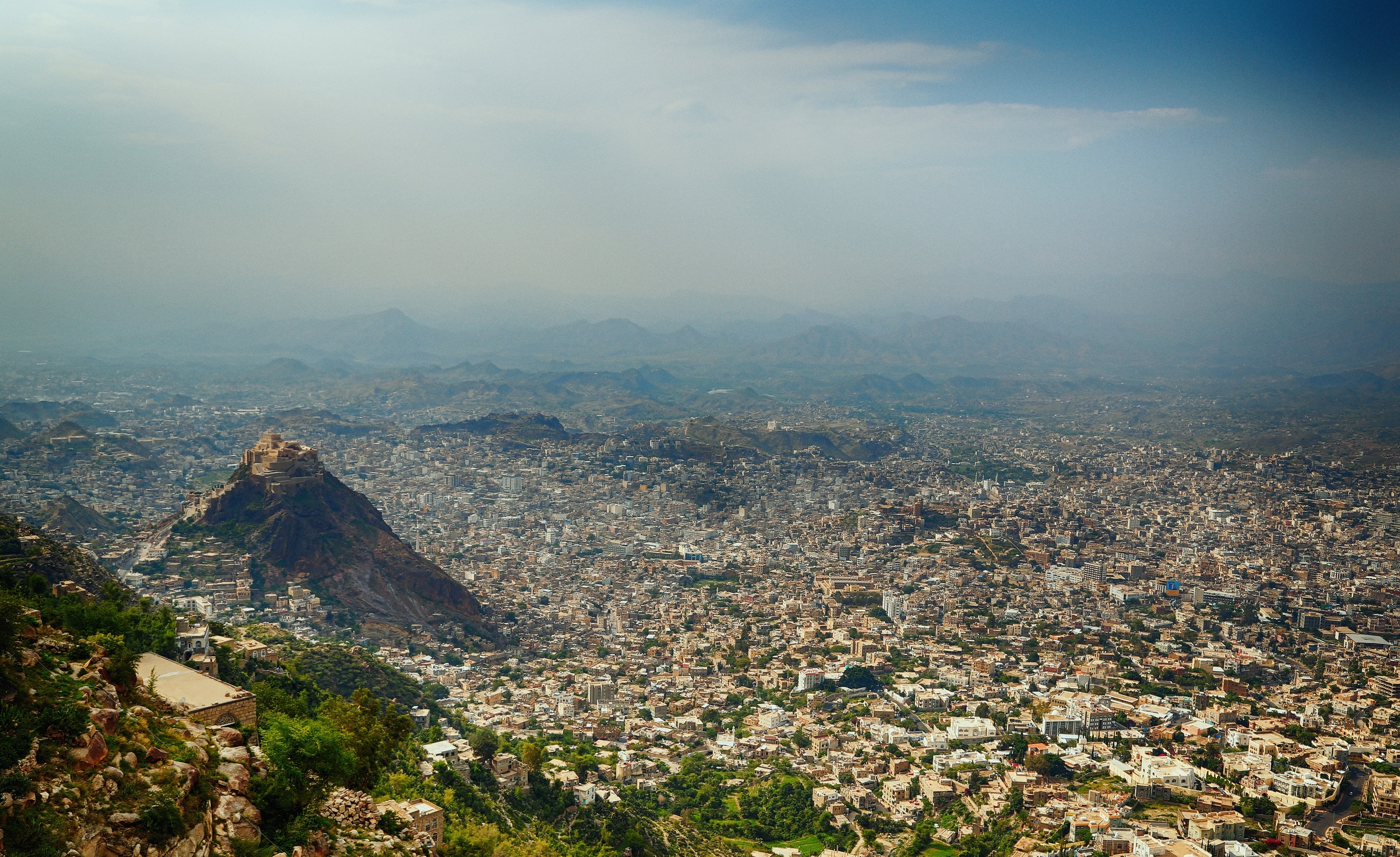 Tai'zz